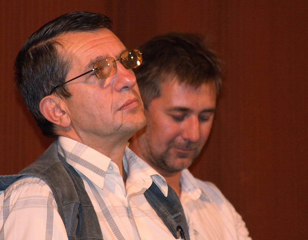 Леони́д Афана́сьевич Зашкильня́к (укр. Леонід Опанасович Зашкільняк, родился 25 августа 1949 во Львове, УССР) — украинский историк. Заместитель директора по научной работе в Институте украиноведения им. Крипякевича НАН Украины.